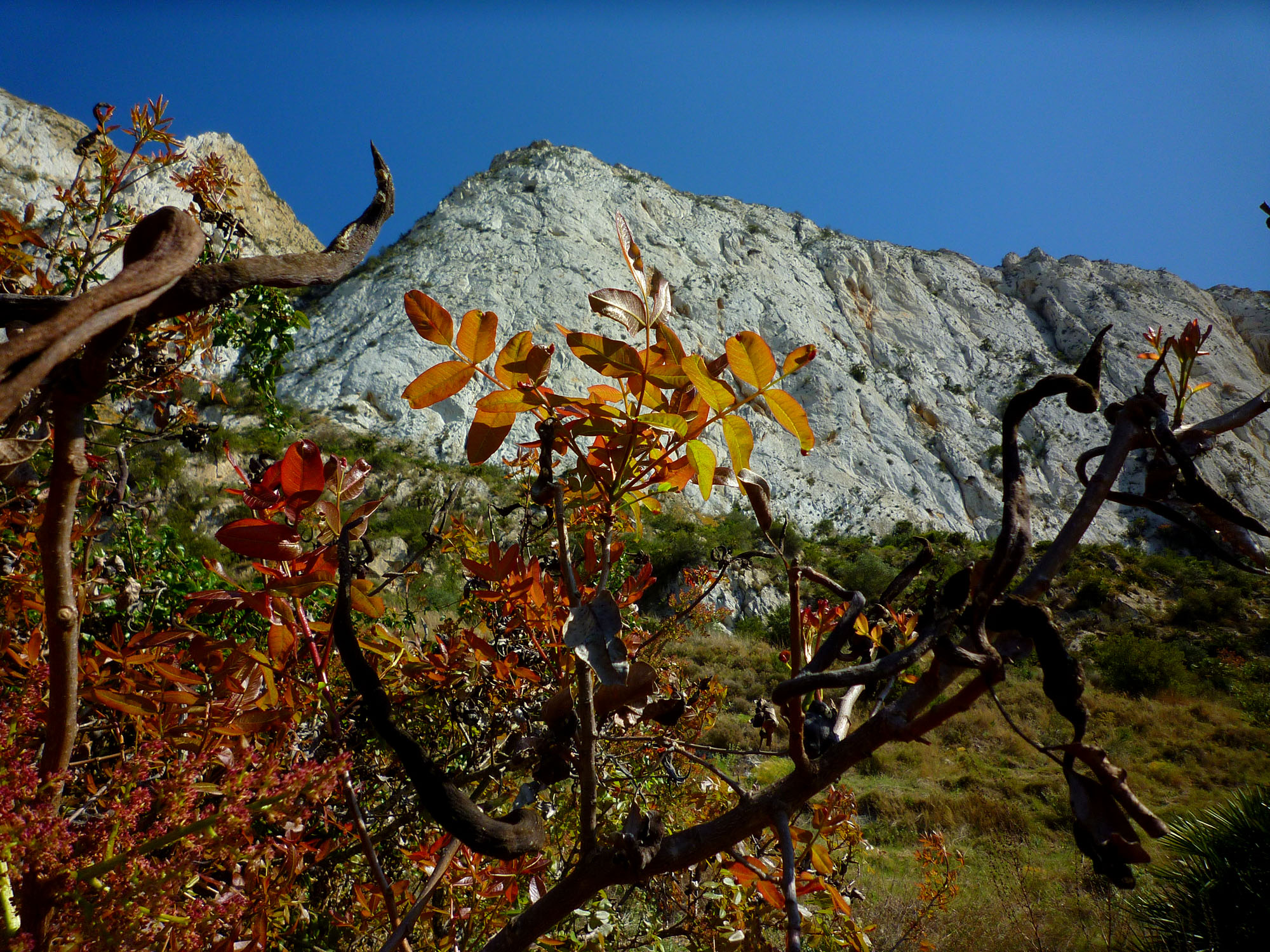 Pistacia terebinthus (Terebinto o cornicabra) en el Parque Natural de la Sierra de la Muela Cabo Tiñoso y Roldán, Cartagena (España)